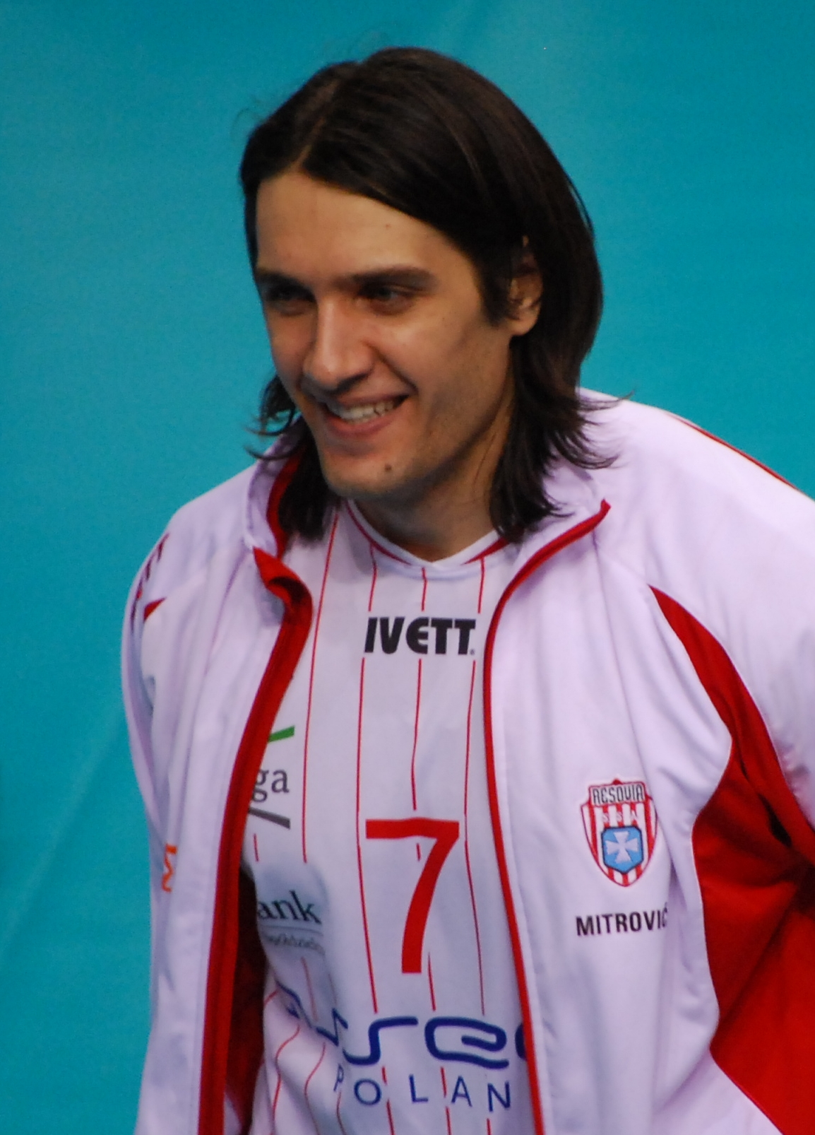 Aleksandar Mitrović